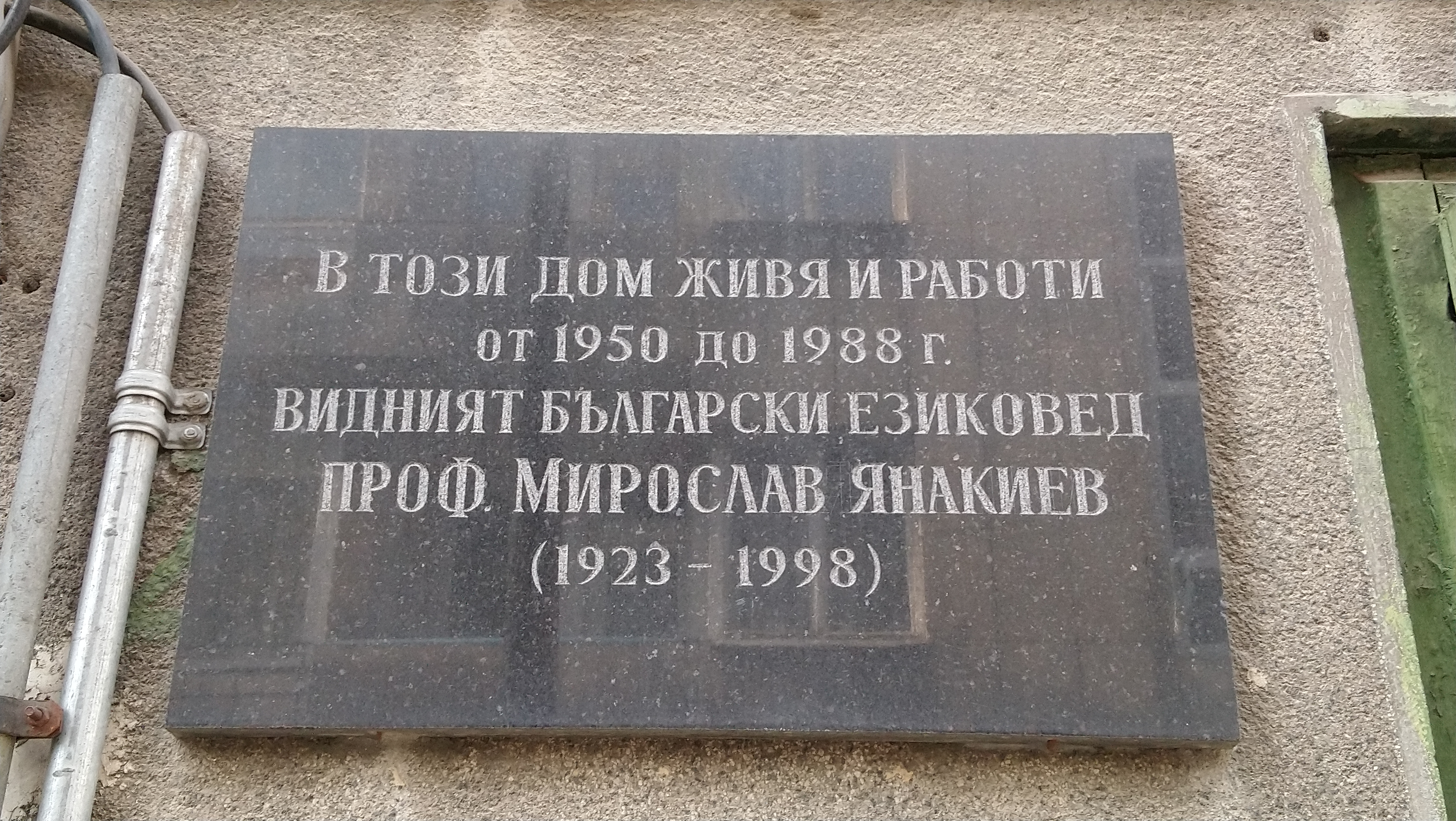 Паметна плоча на езиковеда Мирослав Янакиев, ул. Струмица 2, София